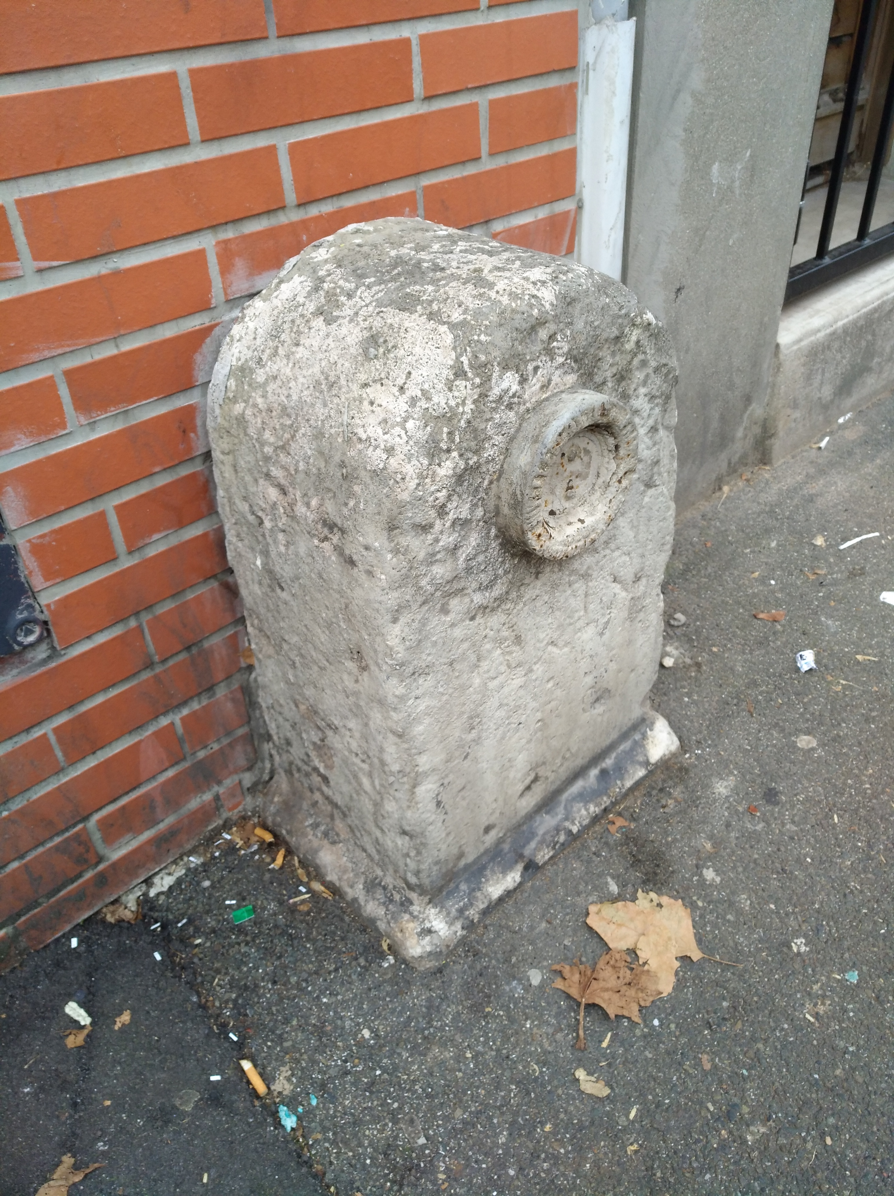 Ancienne borne de nivellement, rue Robespierre, à Montreuil (Seine-Saint-Denis, France).